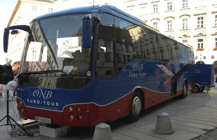 Der Euro-Bus, eine rollende Filiale der Oesterreichischen Nationalbank am Michaelerplatz.